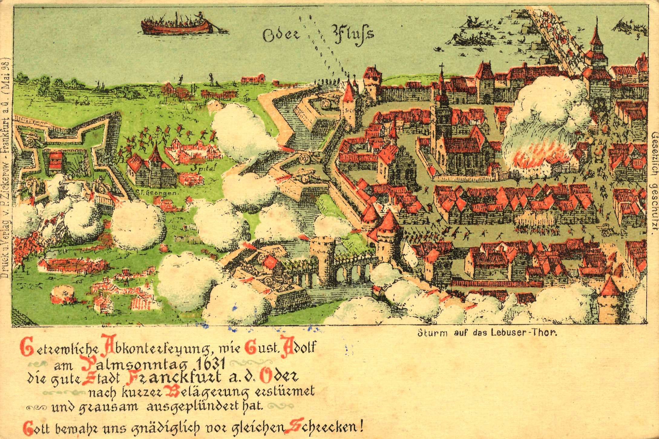 Schlacht von Frankfurt (Oder) 1631 - Sturm auf das Lebuser TorBattle of Frankfurt (Oder) 1631 - Storming of the Lebus Gatetitle QS:P1476,de:"Schlacht von Frankfurt (Oder) 1631 - Sturm auf das Lebuser Tor" label QS:Lde,"Schlacht von Frankfurt (Oder) 1631 - Sturm auf das Lebuser Tor" label QS:Len,"Battle of Frankfurt (Oder) 1631 - Storming of the Lebus Gate" label QS:Lpl,"Oblężenie Frankfurtu nad Odrą przez Szwedów w 1631: natarcie na Bramę Lubuską" Caption bottom left: "Getrewliche Abkonterfeyung, wie Gust. Adolf / am Palmsonntag 1631 / die gute Stadt Franckfurt a. d. Oder / nach kurzer Belägerung erstürmet / und grausam ausgeplündert hat. / Gott bewahr uns gnädiglich vor gleichen Schrecken!" [True depiction, [showing] how Gustavus Adolphus / on Palm Sunday 1631 / the good town Frankfurt (Oder) / after a short siege stormed / and horribly looted [it]. / God mercifully protect us from such horrors!] Caption center right: Sturm auf das Lebuser-Thor [Storming of the Lebus Gate] Publisher's mark border left: Druck u. Verlag v. P. Zickerow - Frankfurt a. O. (Mai 98) [Druck und Verlag von Paul Zickerow - Frankfurt (Oder) (Mai 1898)] [Print and publishing by Paul Zickerow - Frankfurt (Oder) (May 1898)] Publisher's mark border right: Gesetzlich geschützt. [Protected by law]